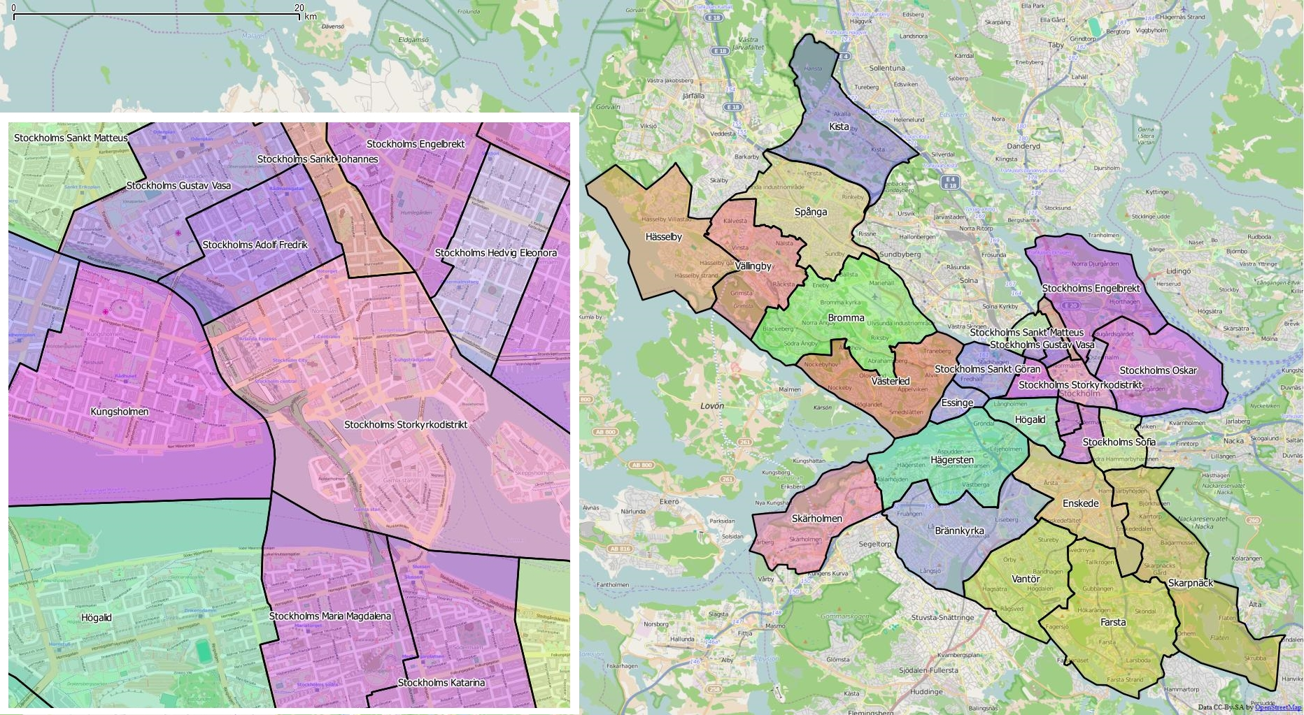 Distriktsindelningen i Stockholms kommun